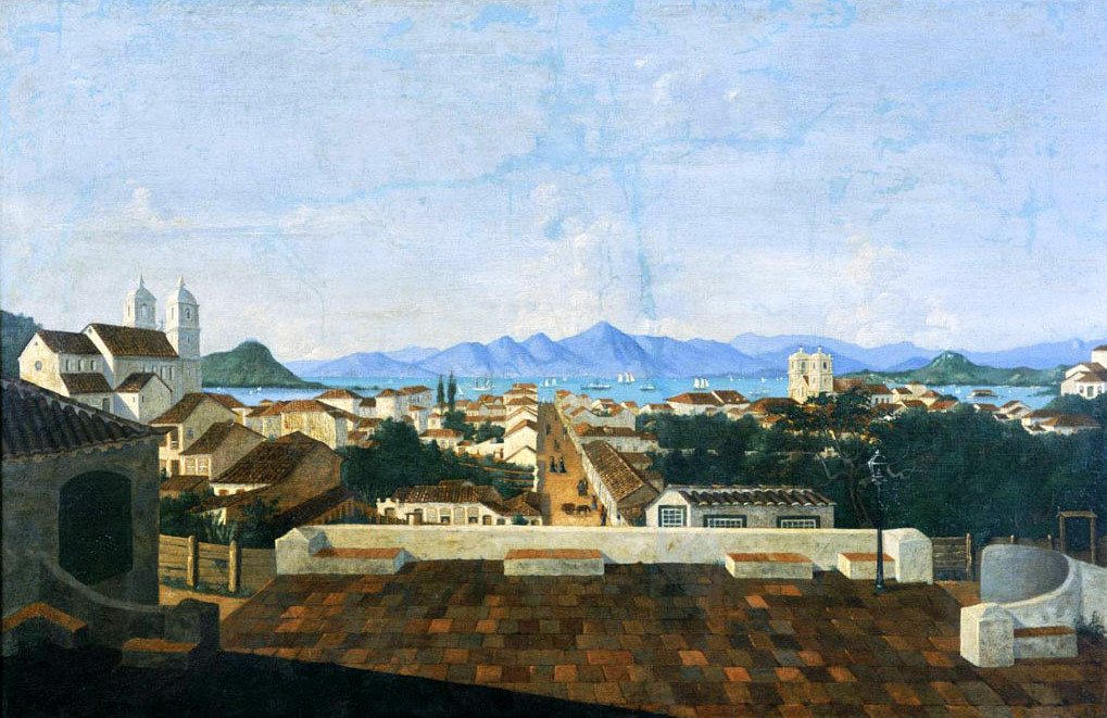 Uma Visão de Nossa Senhora do Desterro, Óleo sobre tela - 71,7 x 119,2 cm